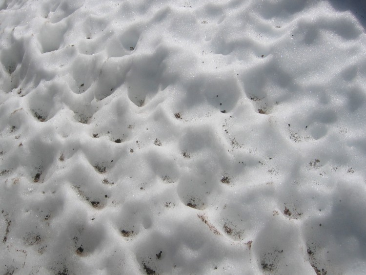 Kryokonite auf Teide, Teneriffa